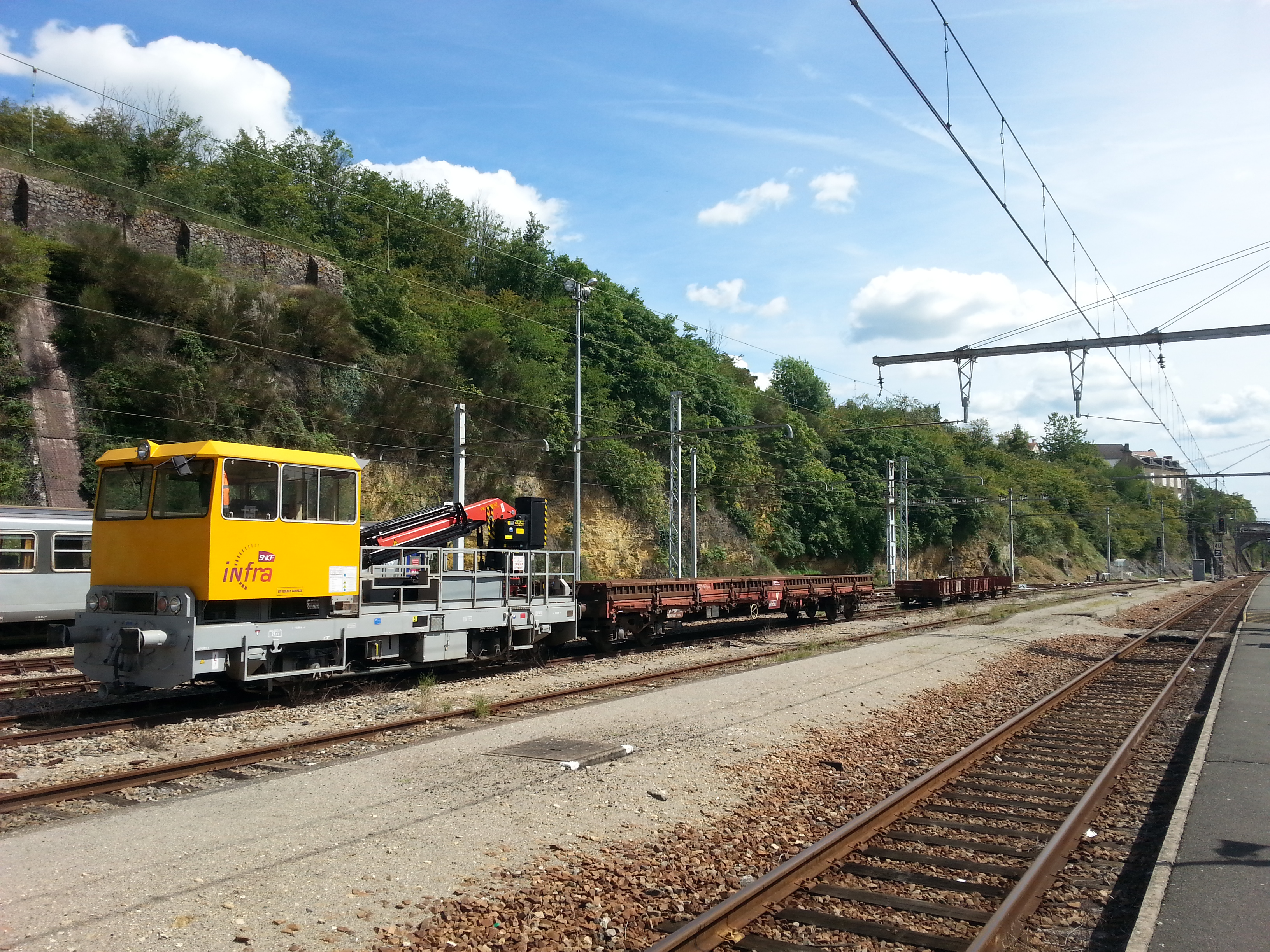 Gare d'Argenton-sur-Creuse (36) : La draisine Unifiée 84 stationnée sur les voies de services.